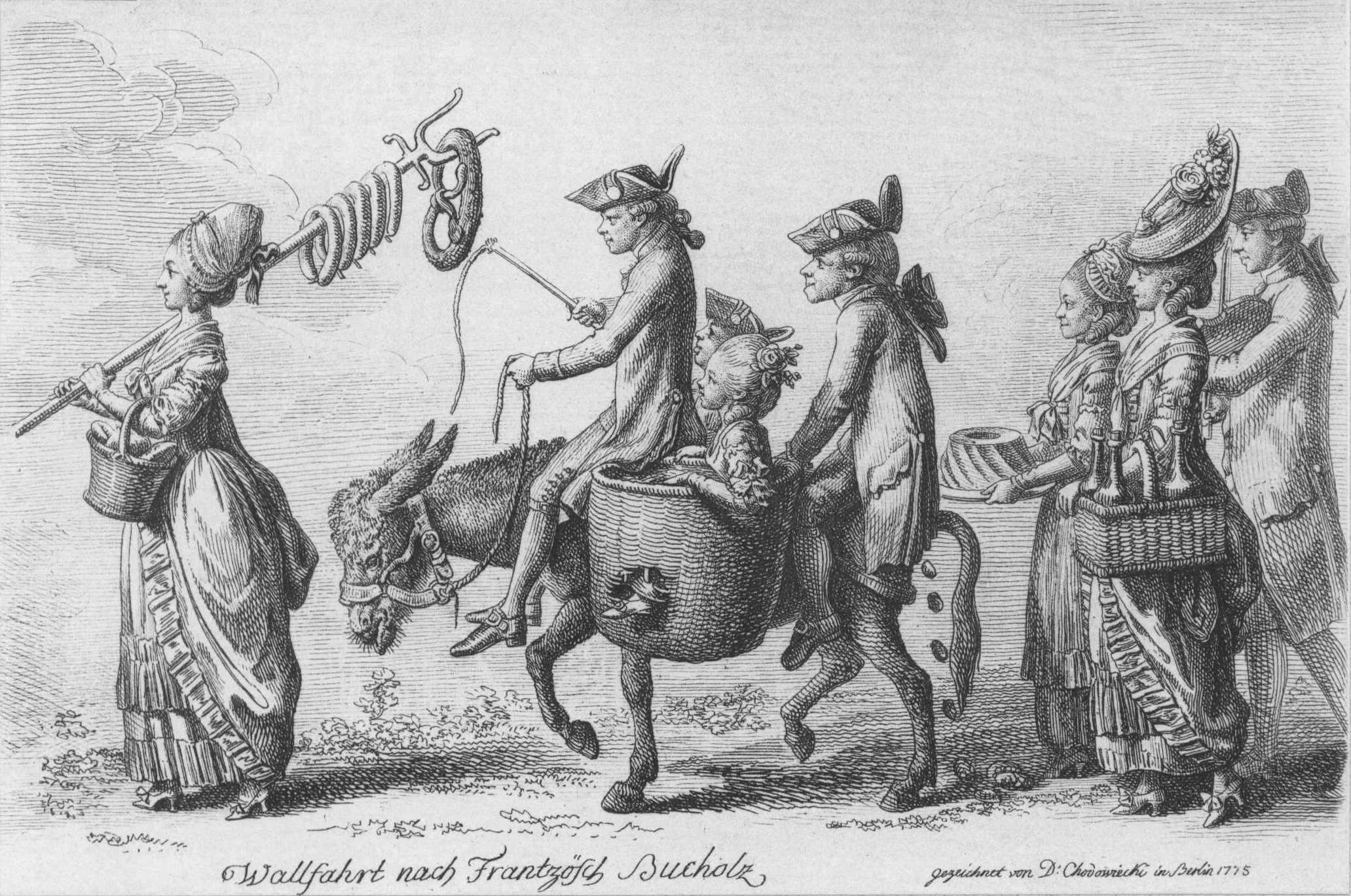 Die Wallfahrt nach Französisch-Buchholz. (Beschreibung lt. Quelle)